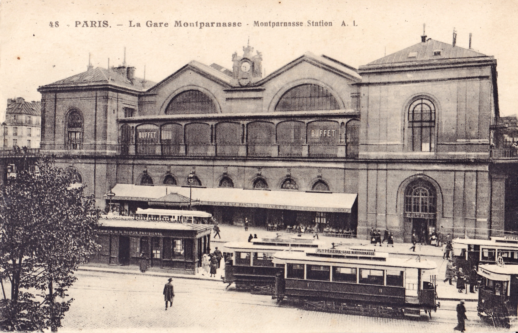 Carte postale ancienne éditée par AL, n°48 :PARIS - La Gare Montparnasse.Le kiosque porte l'enseigne "... communs de la région parisienne" (STCRP), ce qui permet la datation du cliché.